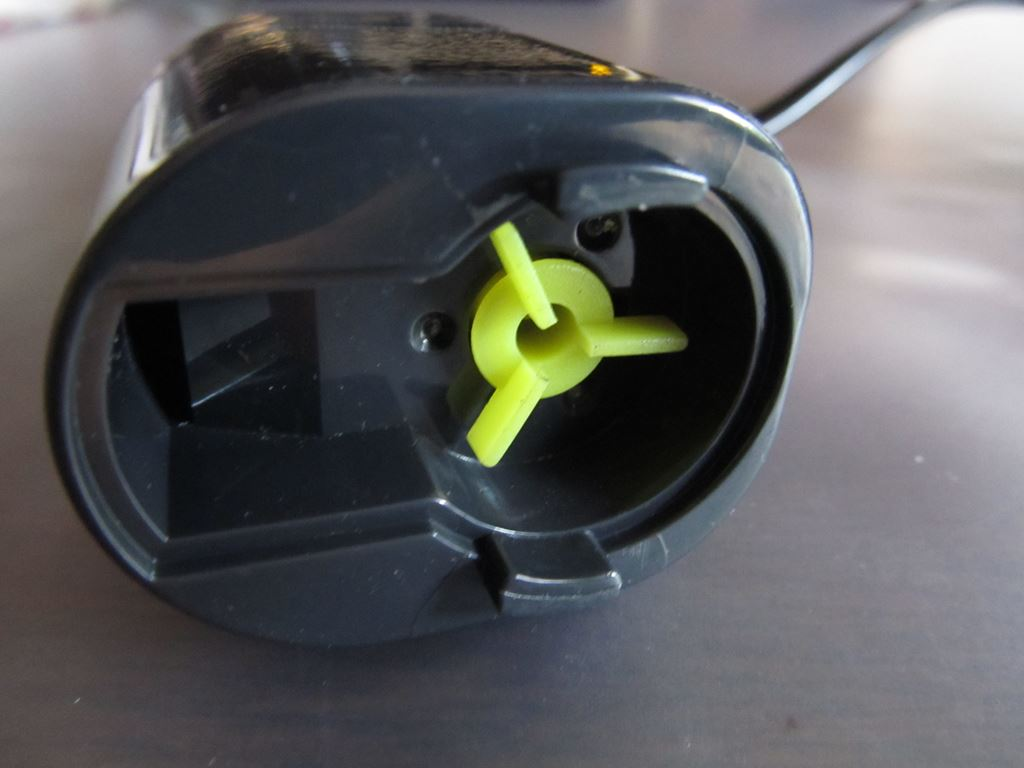 ジェックス・外掛け式スリムフィルター「スリムフィルターＳＳ」インペラー（羽根車）